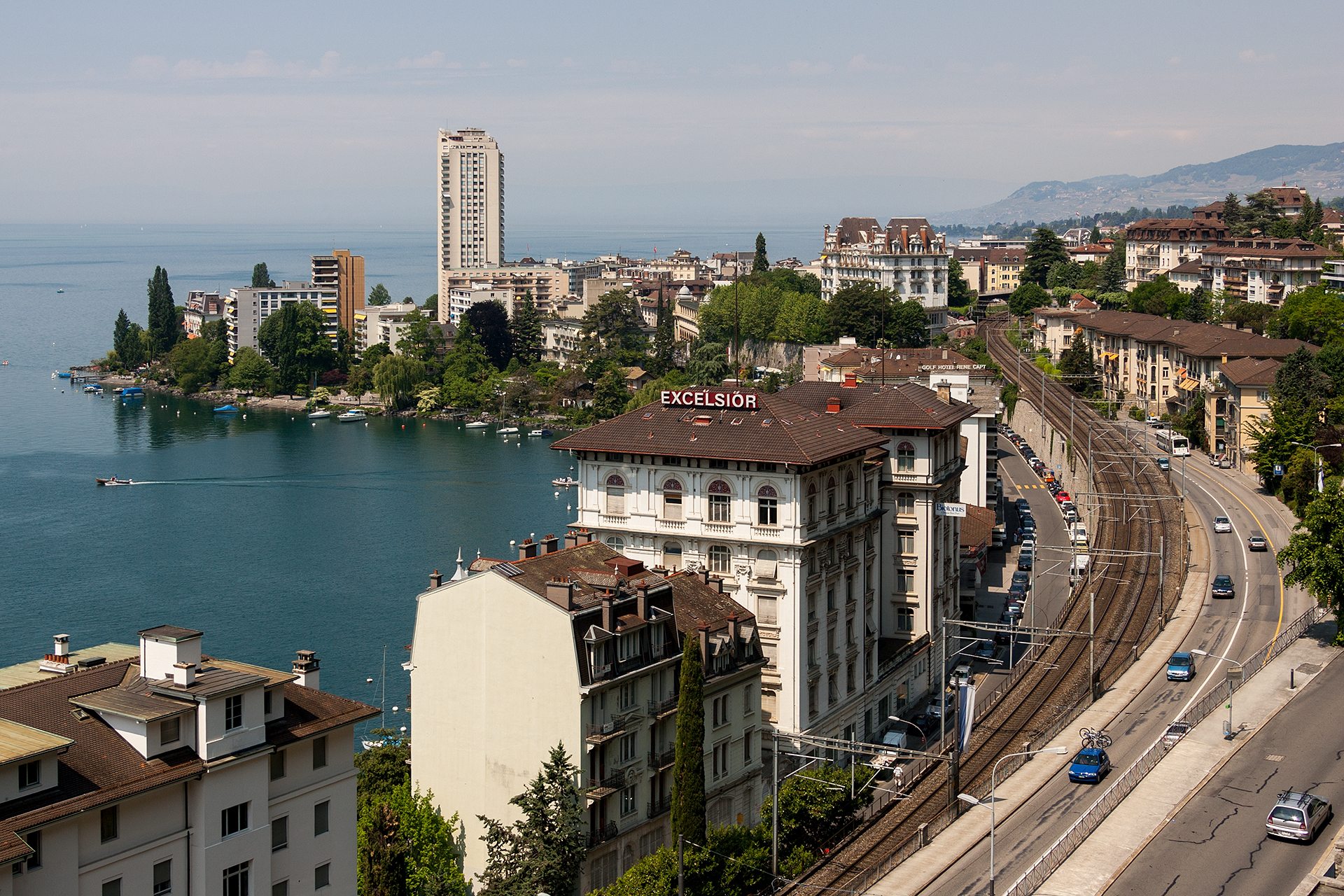 Blick auf Montreux (VD)